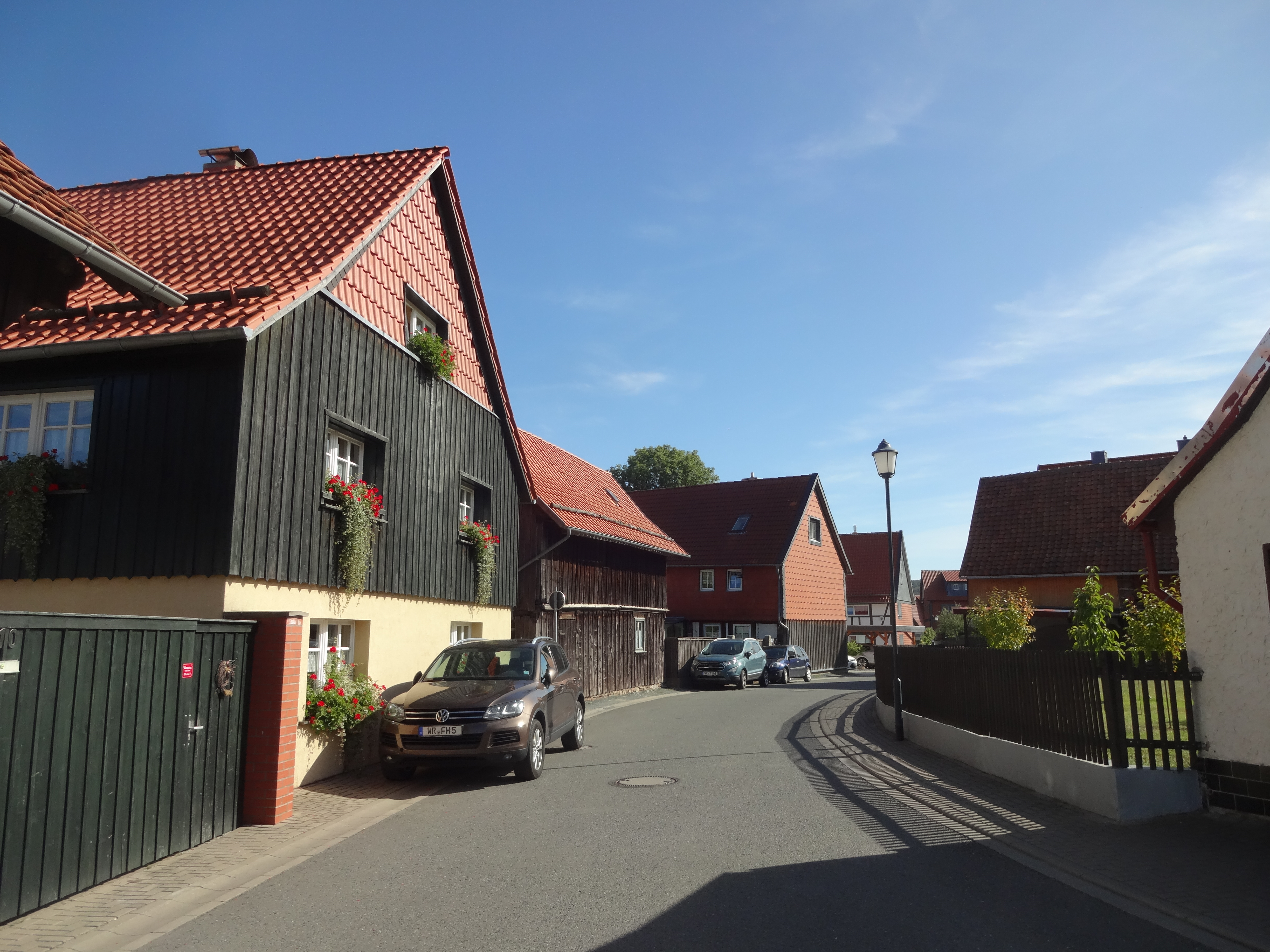 denkmalgeschützte Häusergruppe Steinweg 5-10 in Drübeck